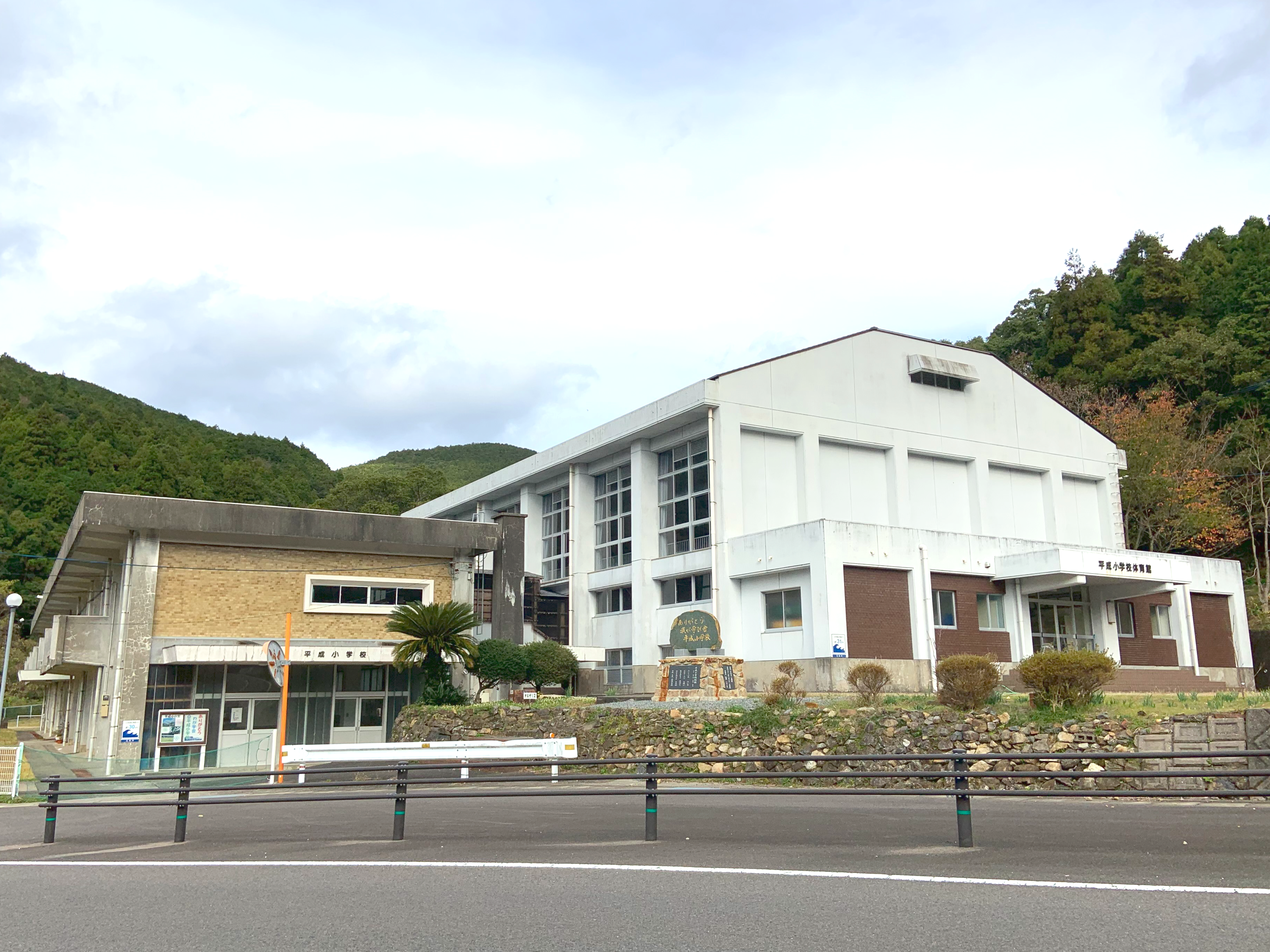 五島市立平成小学校、校舎および体育館。2019年廃校。